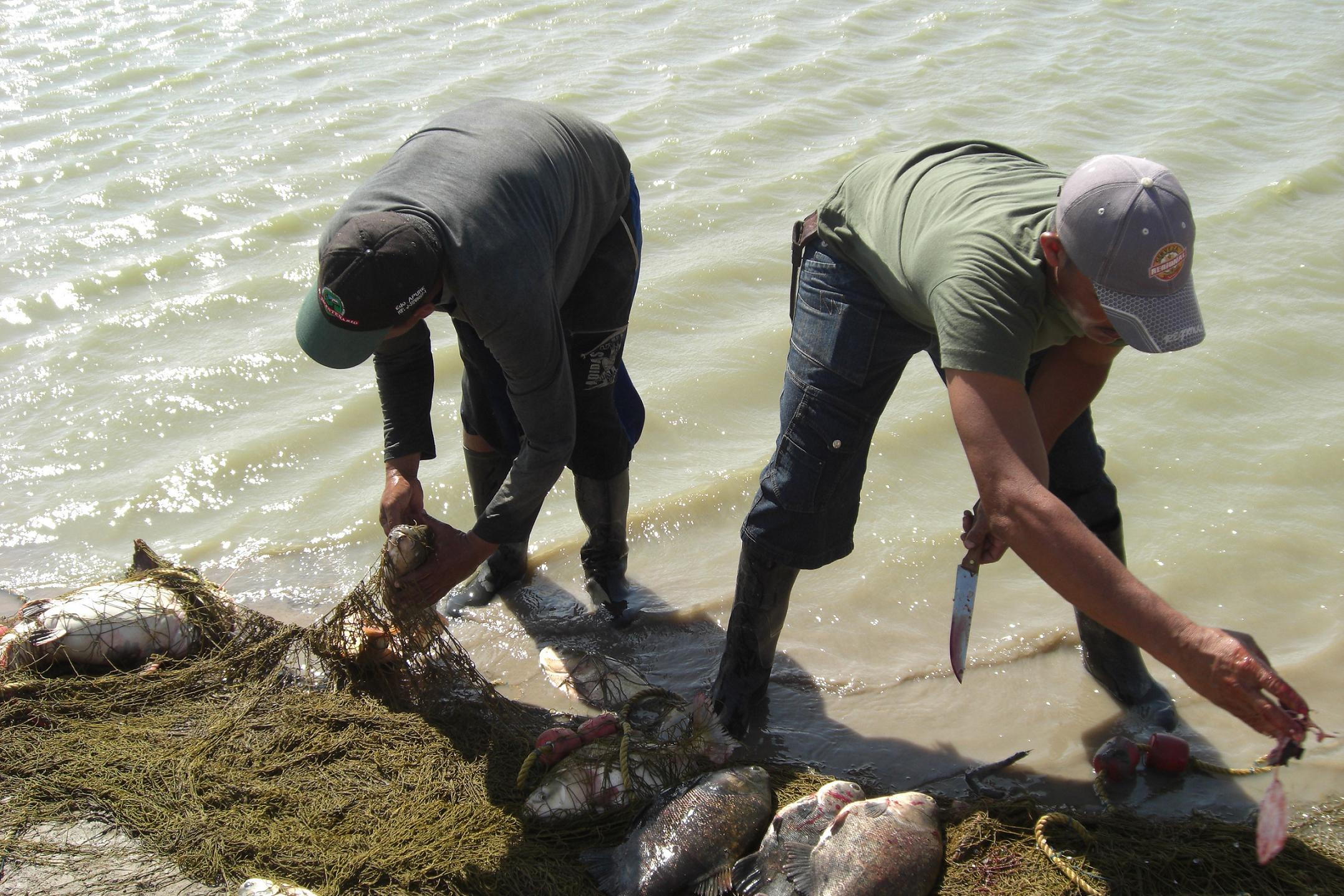 Pescadores artesanales en un remanso de un río en Apure vía Guachara, Achaguas